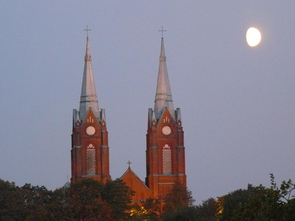 Šviečia iš toli...